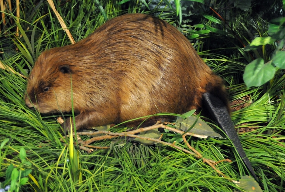 Reiss-Engelhorn-Museen, Zeughaus, Mannheim, Baden-Württemberg, Deutschland